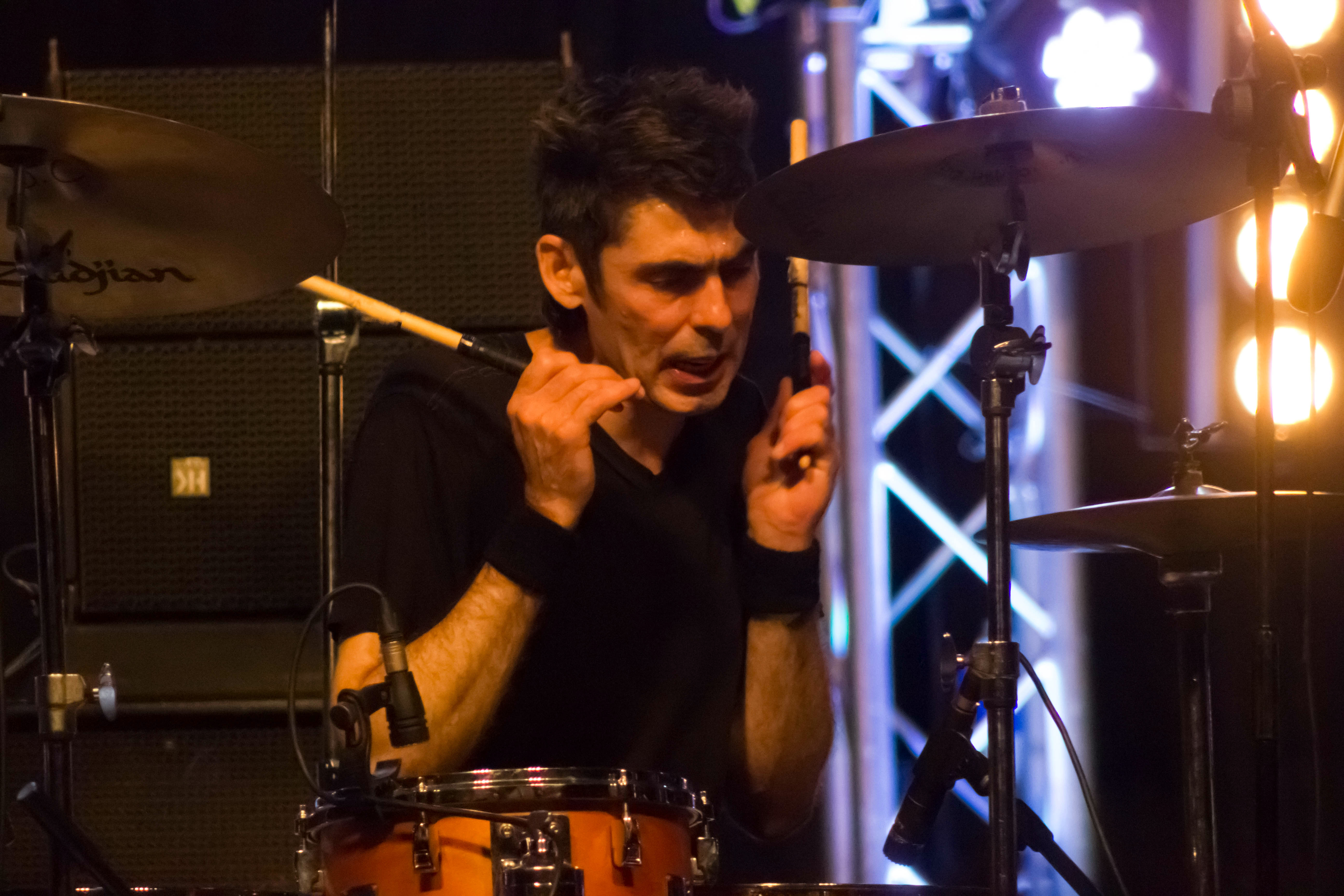 Todd Trainer, batería da banda estadounidense Shellac, no NOS Primavera Sound 2015 de Porto.